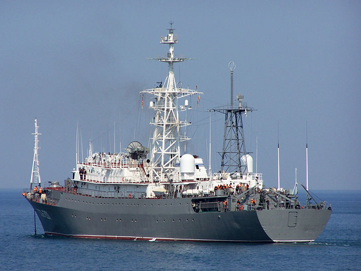 Средний разведывательный корабль «Приазовье». Проект 864. Севастополь. Черноморский флот РФ.